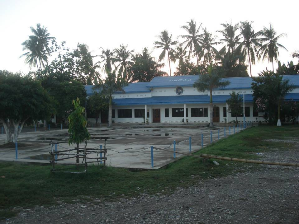 Dili